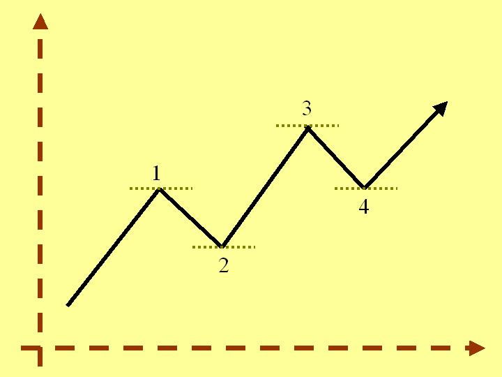 Description: esquema de una tendencia alcista con soportes y resistencias Source: Trabajo propio Author: LCB Date: Julio 21, 2006 Authorization: Dominio Público